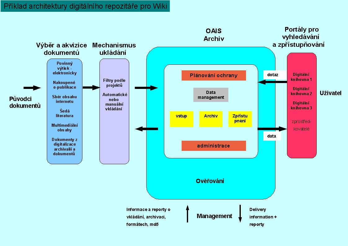 schema digitálního repozotáře